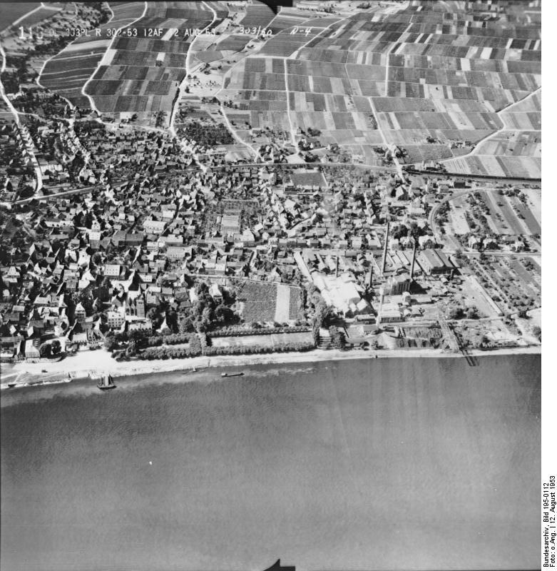 Rheinbefliegung der Alliierten 1953